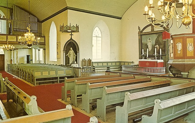 Interiørbilde fra Brønnøy kirke i Brønnøysund